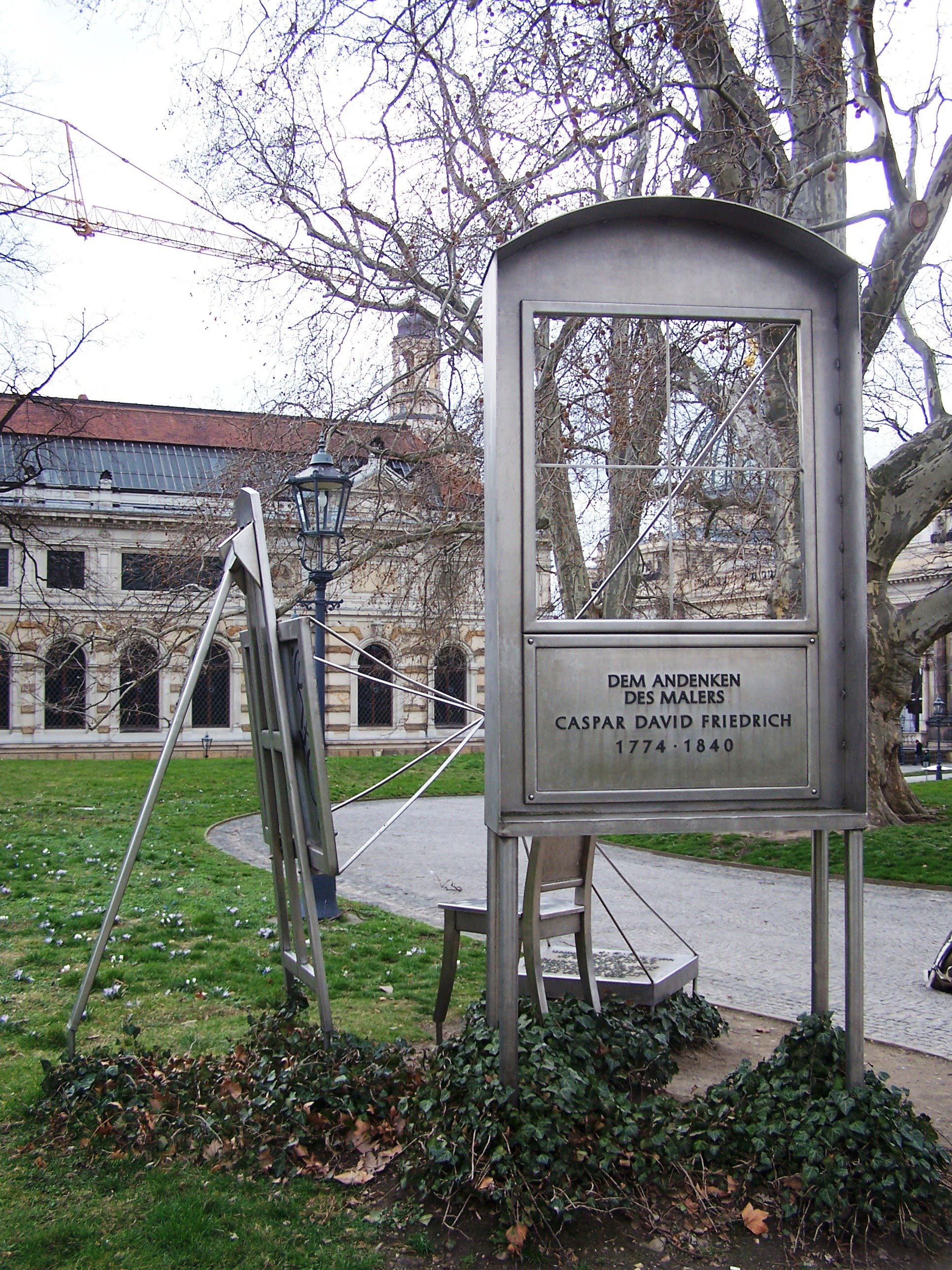 Caspar-David-Friedrich-Denkmal auf der Brühlschen Terrasse in Dresden; Künstler: Wolf-Eike Kuntsche